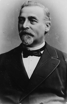 August Eschenburg, Fürstlich Lippischer Staatsminister und Kabinettsminister